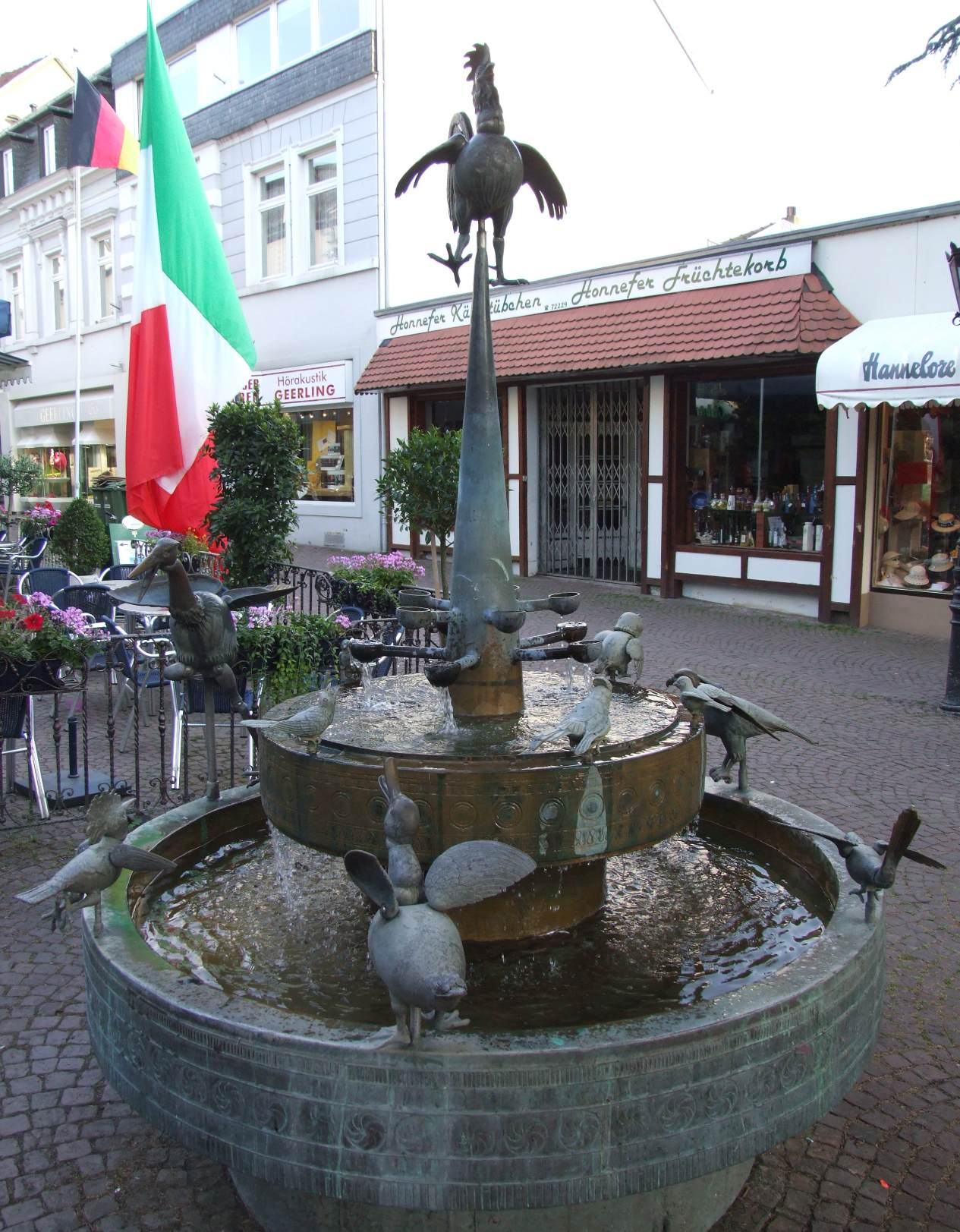 Vogelbrunnen (um 1980) von Bonifatius Stirnberg in Bad Honnef, Franz-Xaver-Trips-Platz